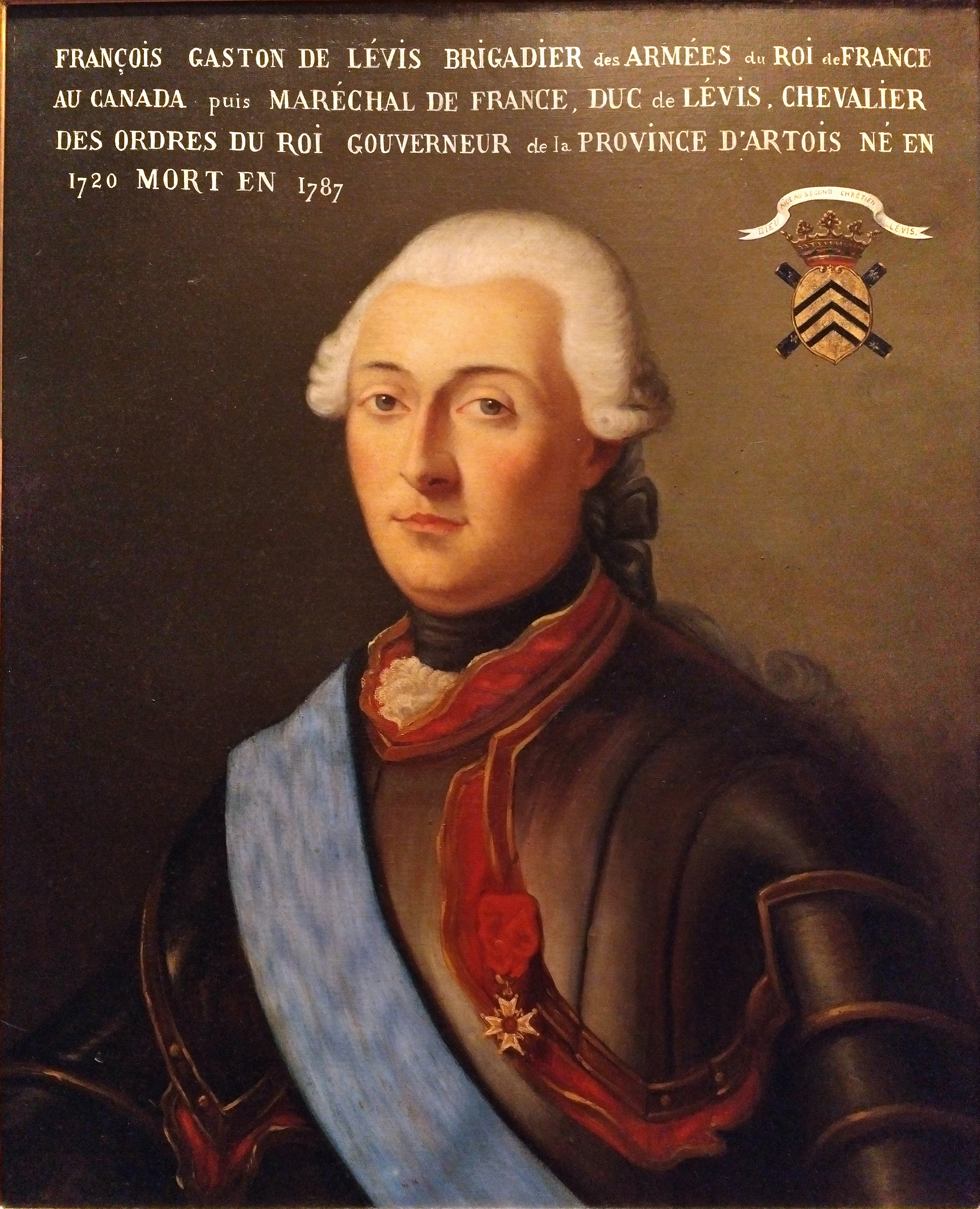 François-Gaston de Lévis (1720-1787), huile sur toile François-Gaston de Lévis arrive en Nouvelle-France en 1756, en qualité de commandant en second des troupes françaises. Il participe aux combats dans la région des Grands-Lacs, puis succède au général Montcalm (1712-1759), mort à la bataille des Plaines d'Abraham, à titre de commandant en chef des troupes françaises. Il repousse les troupes anglaises à l'intérieur des murs de Québec à partir de Sainte-Foy. Il entreprend ensuite le siège de la ville, mais l'arrivée de renforts britanniques l'oblige à se replier vers Montréal où il doit capituler à l'automne de 1760. À son retour en France, il est nommé maréchal de France, puis duc de Lévis. E. Trochsler d'après un tableau appartenant à la galerie de M. le comte Raimond de Nicolay, Le maréchal de Lévis, huile sur toile, 71,5 x 58,2 cm, Montréal, Musée du château Ramezay, MCR1998.1522.